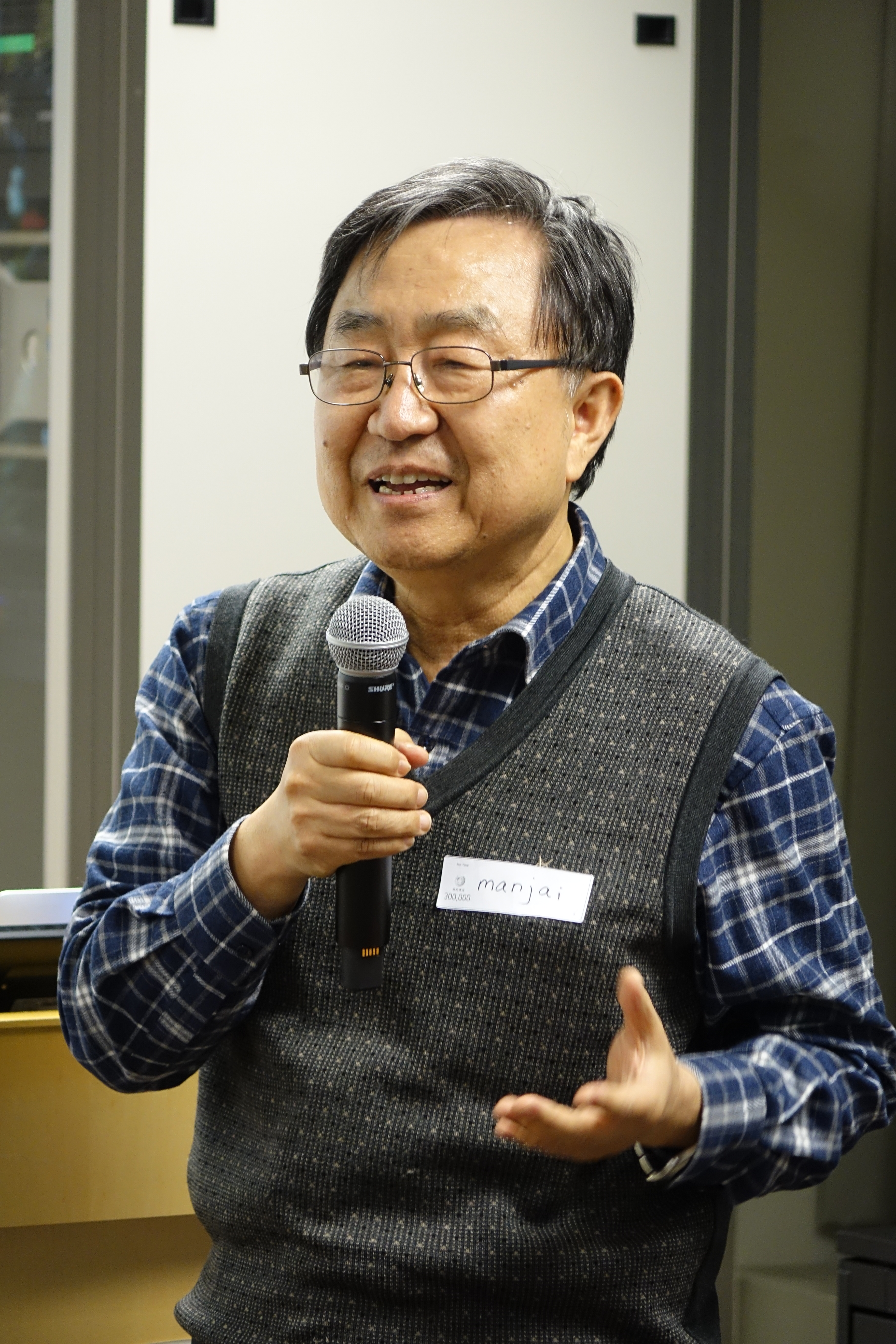 2015년 2월 13일 한국 위키미디어 협회 이사장 이만재